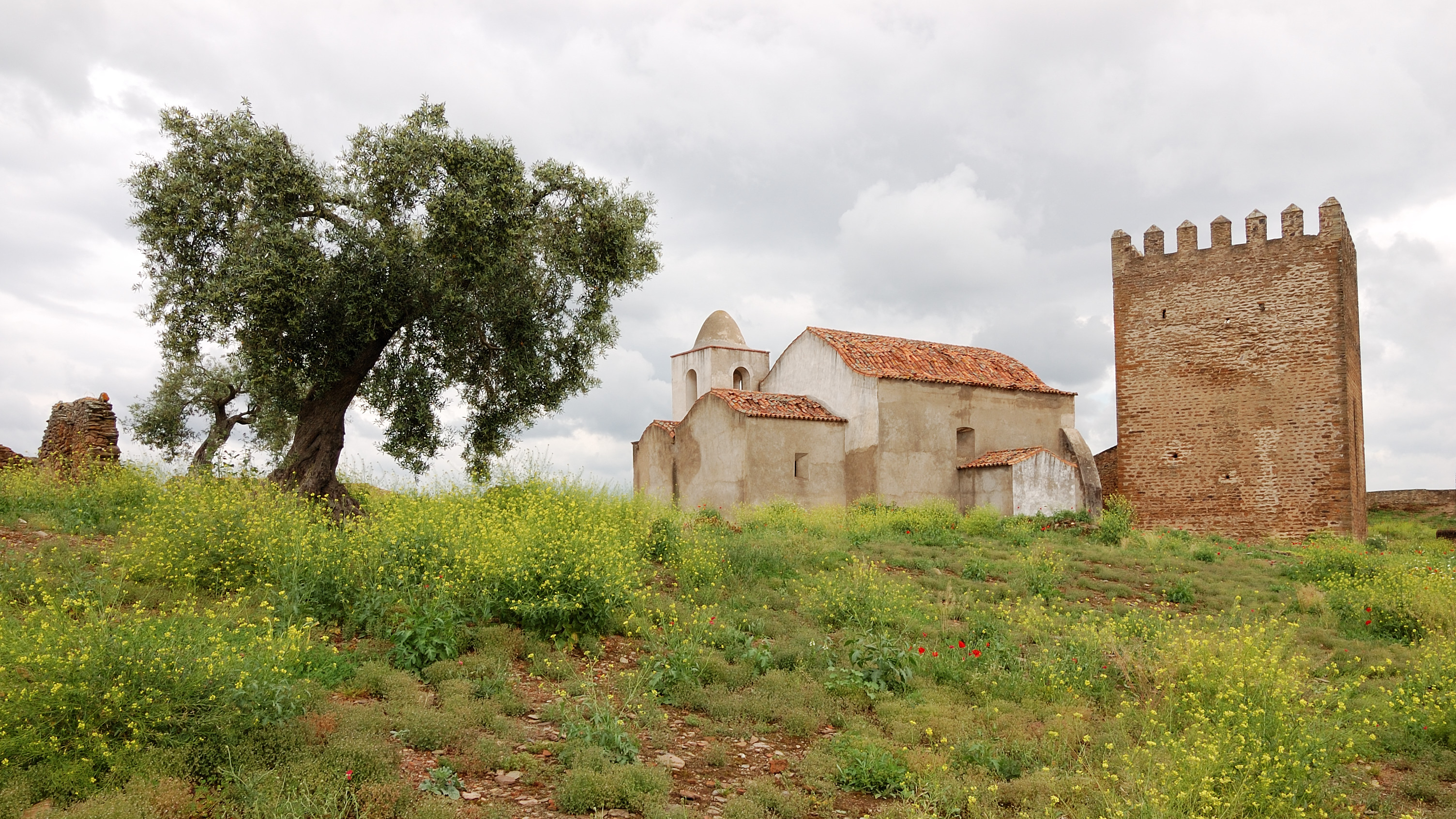 Noudar, Barrancos, Portugal [2011]